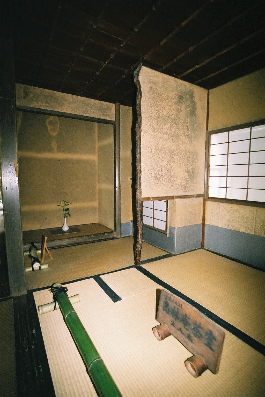 慈光院の茶室「高林庵」。(2003/06/22 Jikouin Temple, Yamato-Koriyama, Nara, JAPAN)TeaHouse "Kourin-an"